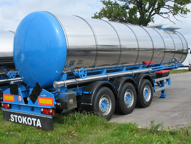 Полуприцеп-цистерна для транспортировки тёмных нефтепродуктов